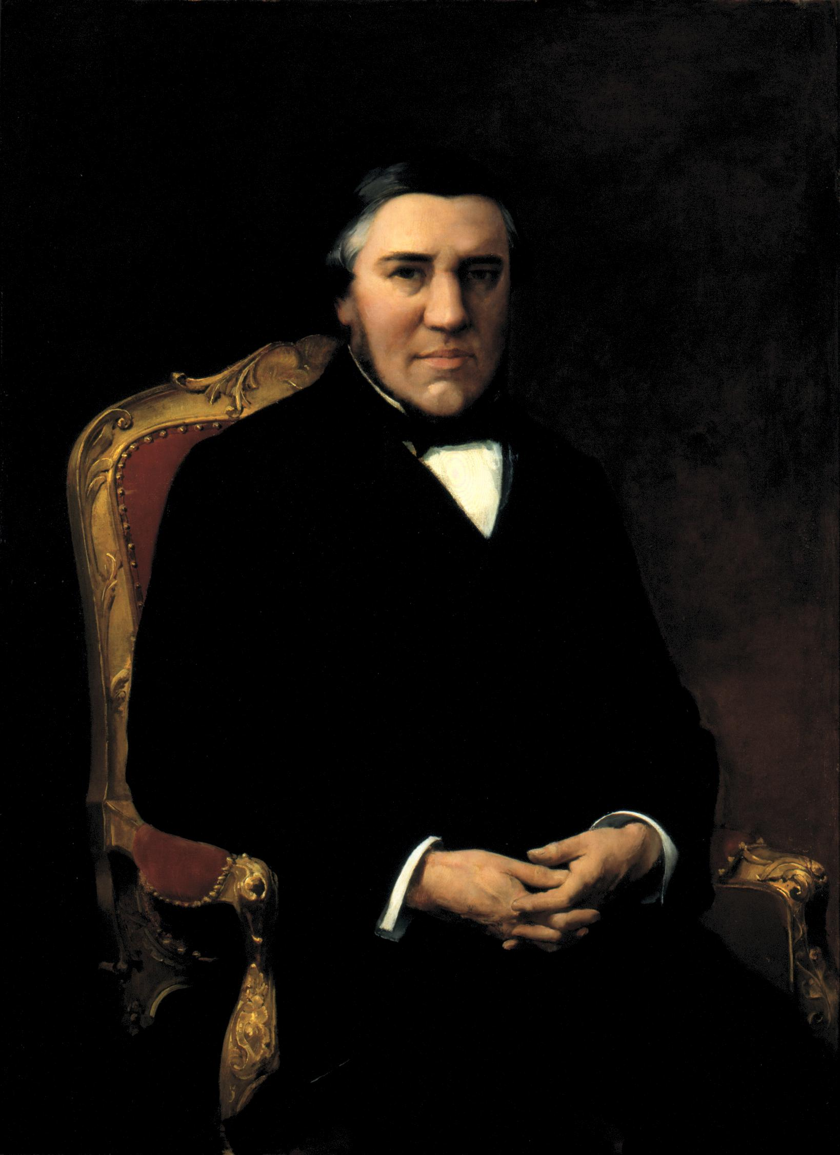 Retrato del político español Juan Bravo Murillo (1803-1873).